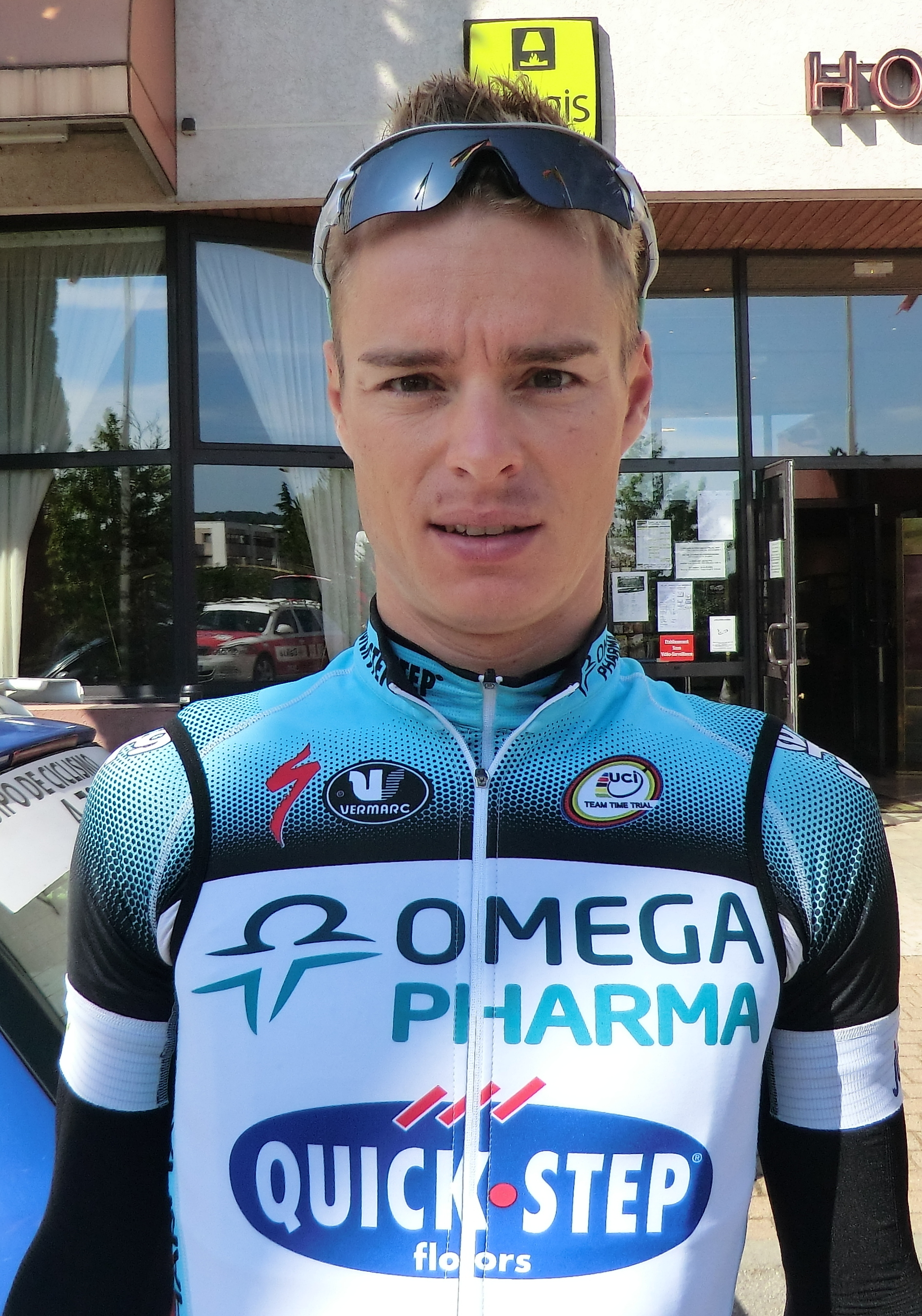 Coureurs à l'échauffement au matin du prologue du tour de l'Ain 2013, à l'hôtel Lyon-Est à Saint-Maurice-de-Beynost.